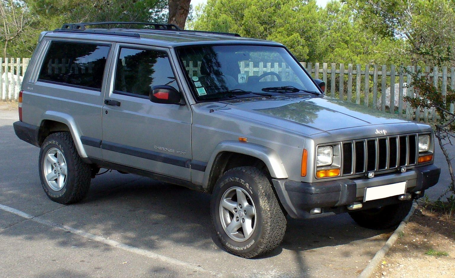 Jeep Cherokee Sport 4x4